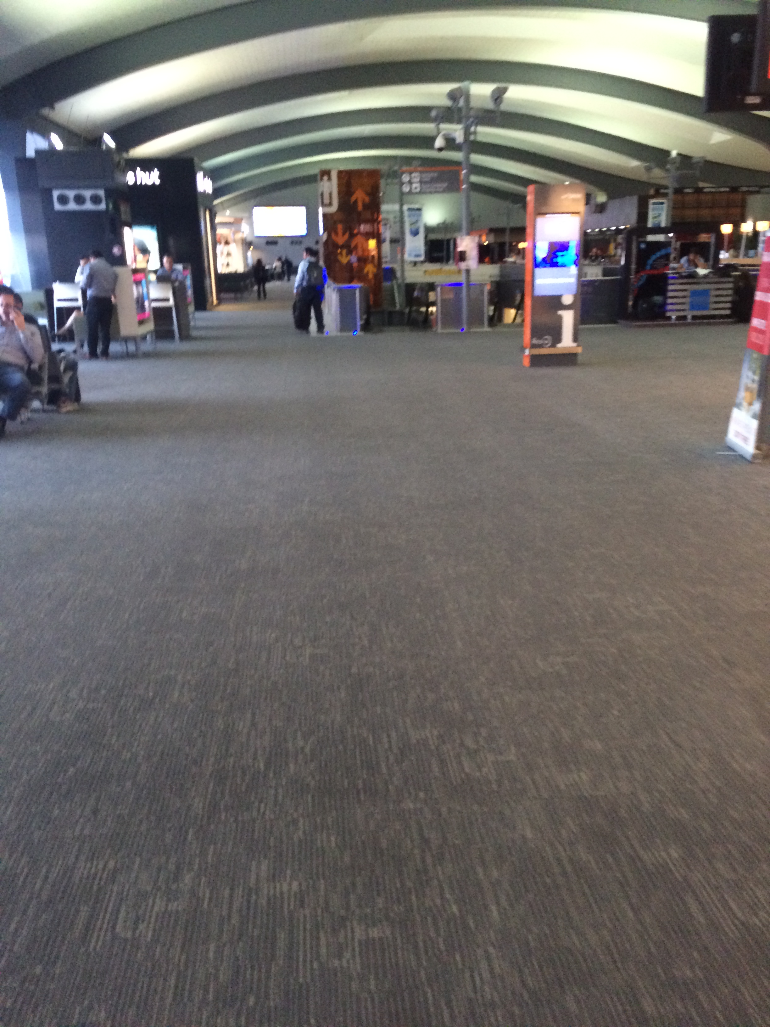 Terminal B del Aeropuerto Internacional de Monterrey.